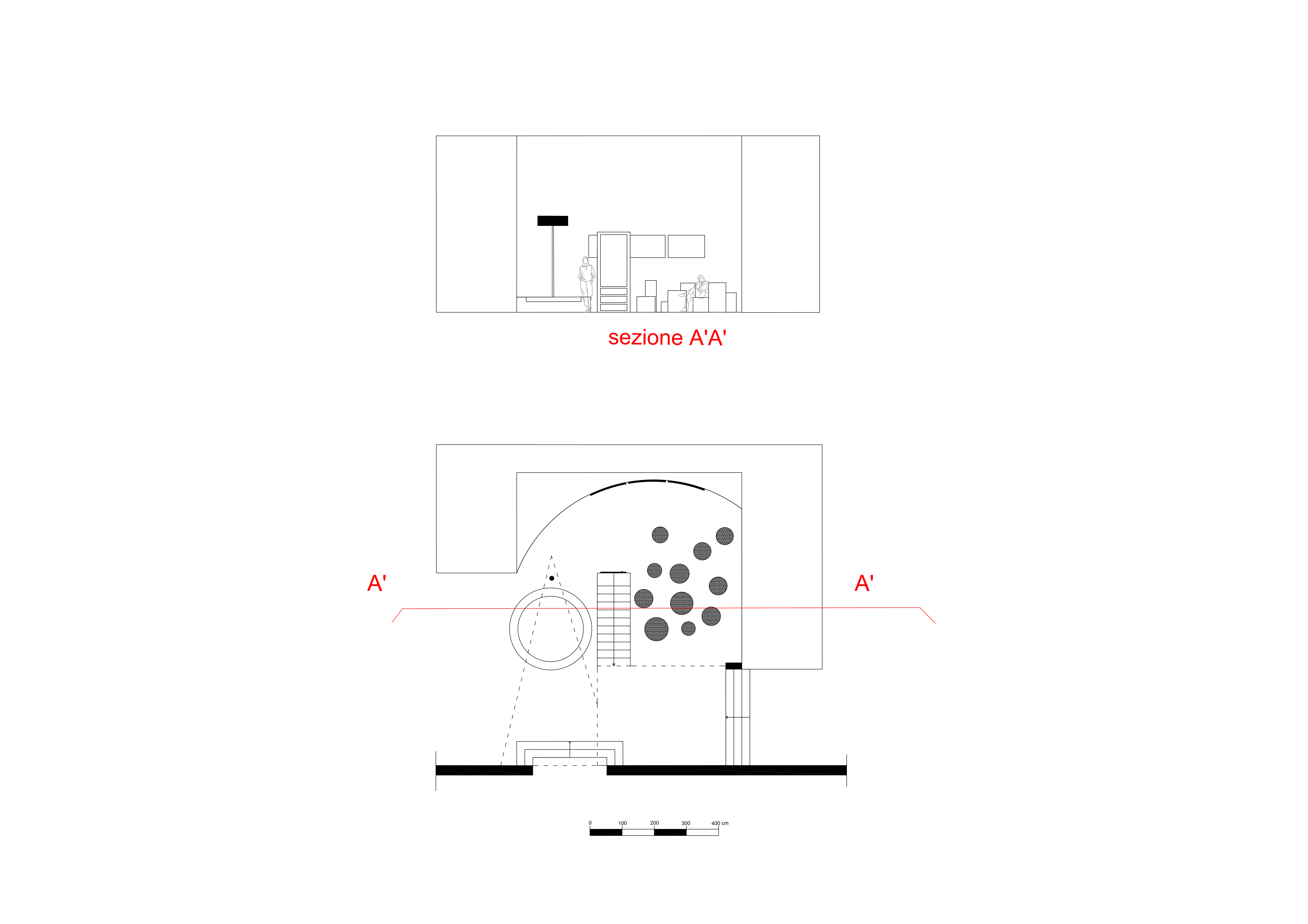 Template:ScreenshotCopyrighted